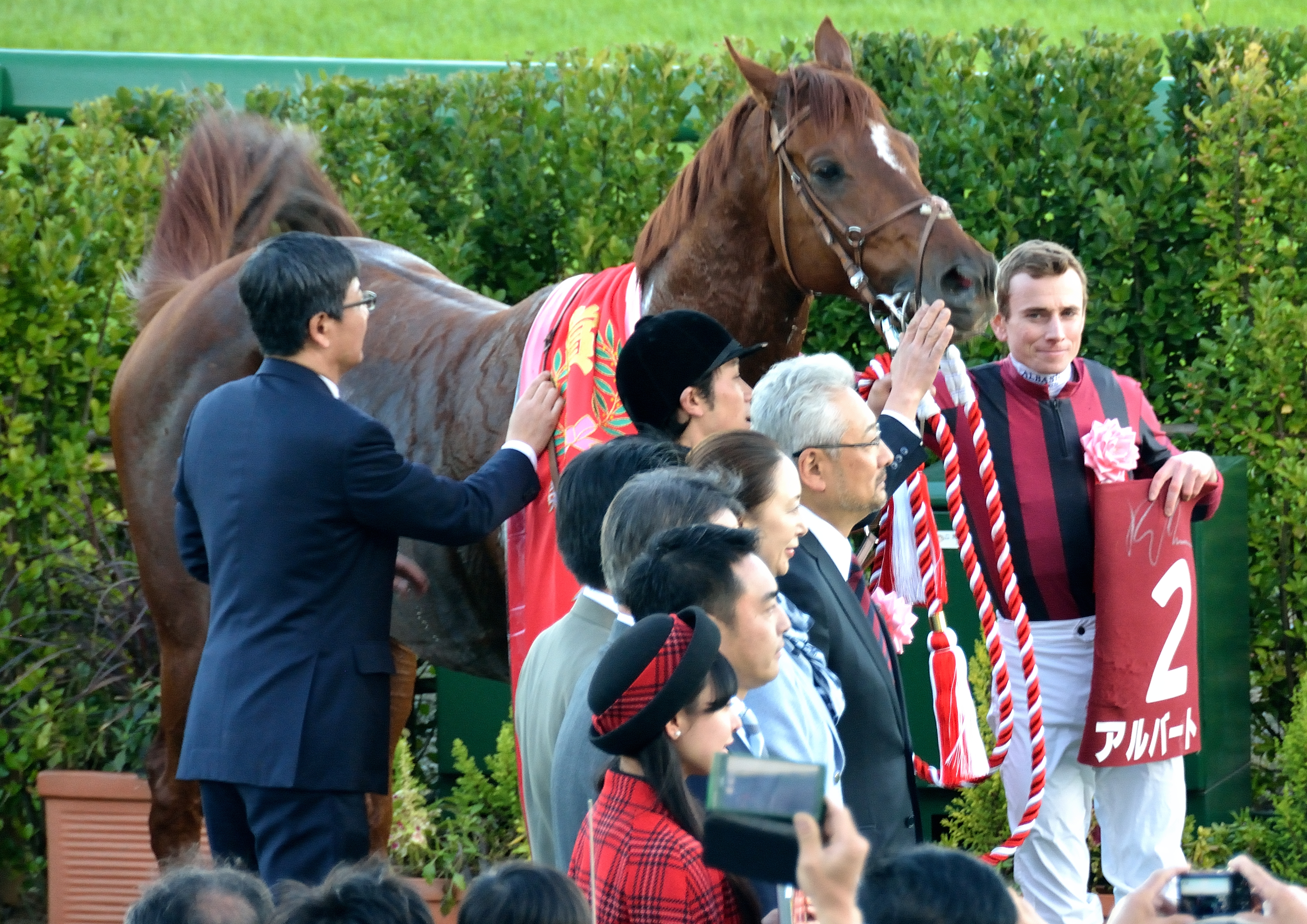 2015年12月5日（土）に中山競馬場の第11競走で行われた第49回ステイヤーズステークスの口取り式にて、勝利馬のアルバートとライアン・ムーア騎手を、観客席から撮影したもの。